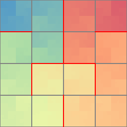 Corba de Hilbert amb els marges indicats